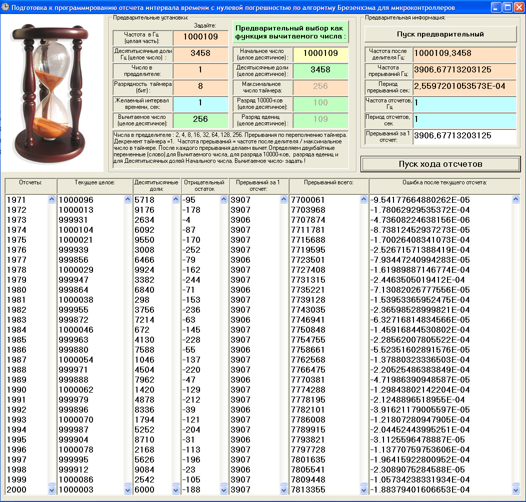 Диаграмма, поясняющая ход алгоритма Брезенхэма